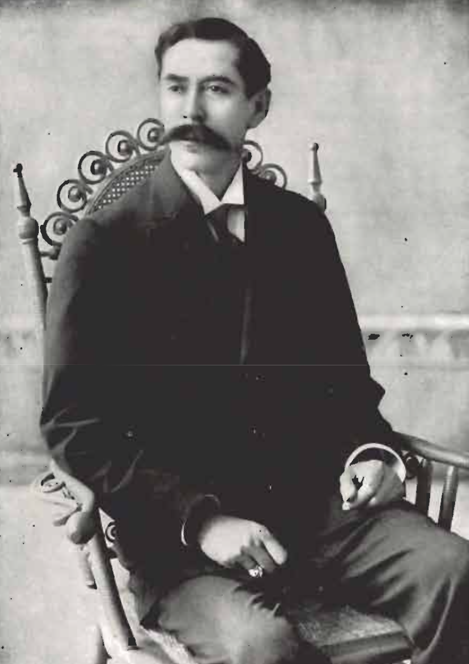 Araujo, quien era médico de profesión, implantó una serie de reformas sociales y económicas.La política reformista de Araujo se interrumpió por su asesinato, el cual fue cometido por tres individuos que acabaron fusilados; aunque la causa y autores intelectuales del crimen nunca han sido aclarados.